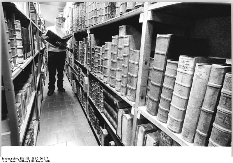 Zittau, Bibliothek, Handschriftensammlung ADN-ZB Hiekel 26.1.89 Bez. Dresden: 30.000 Bände umfaßt die historisch gewachsene Abteilung wissenschaftlicher und heimatgeschichtlicher Altbestand der Christian-Weise-Bibliothek Zittau. Die 1607 als Stadtbibliothek gegründete Sammlung wurde nach dem in Zittau geborenen Dichter und Pädagogen Christian Weise (1642-1708) benannt. Der Begründer des politischen Romans in Deutschland schrieb 1685 das Drama "Masaniello". (siehe 16 N)